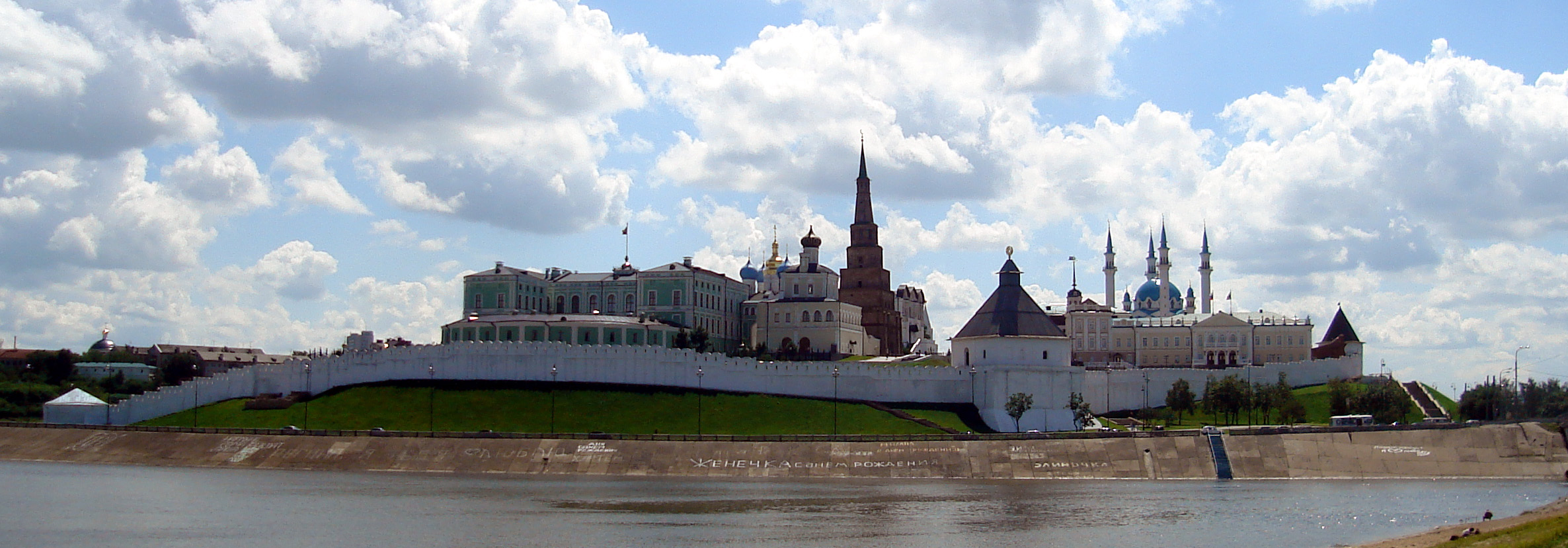 Kazan Kremlin